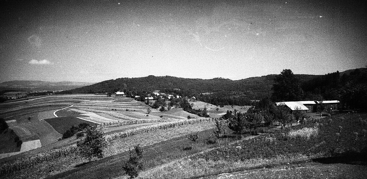 Vrbičje, v ozadju Tabor.